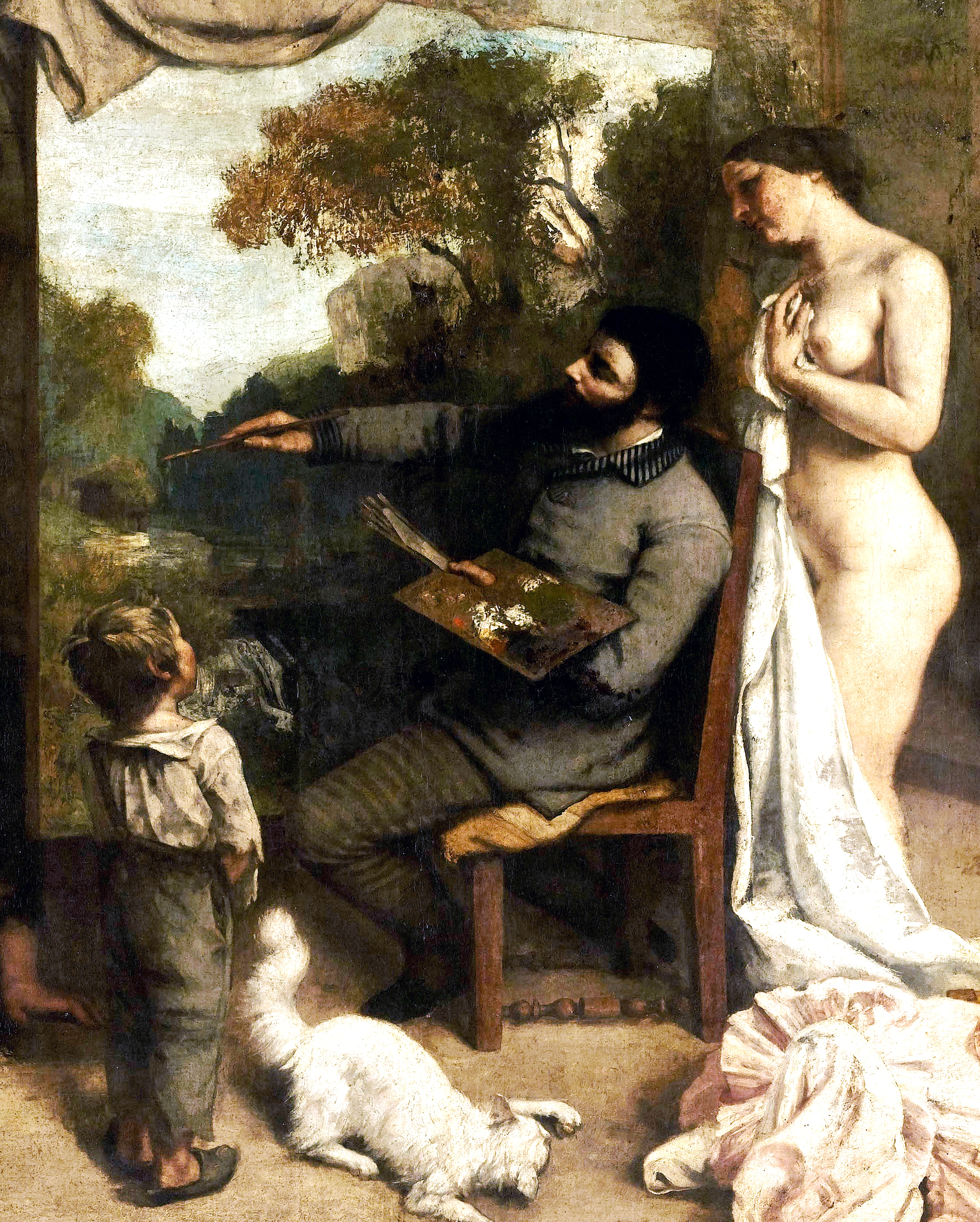 detail 2b: Self-portrait